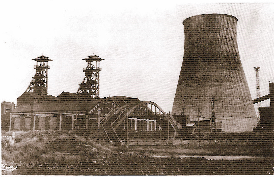 Fosse Heurteau à Hornaing aujourd'hui disparue.